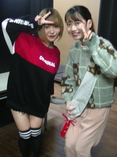 あいあいパーティー (2018年10月)